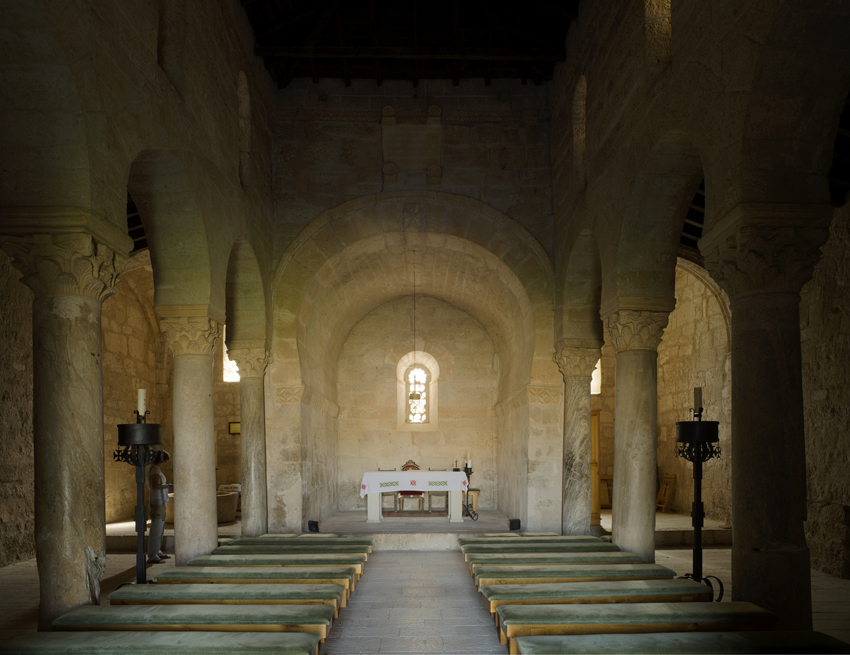 Iglesia de San Juan Bautista, 661